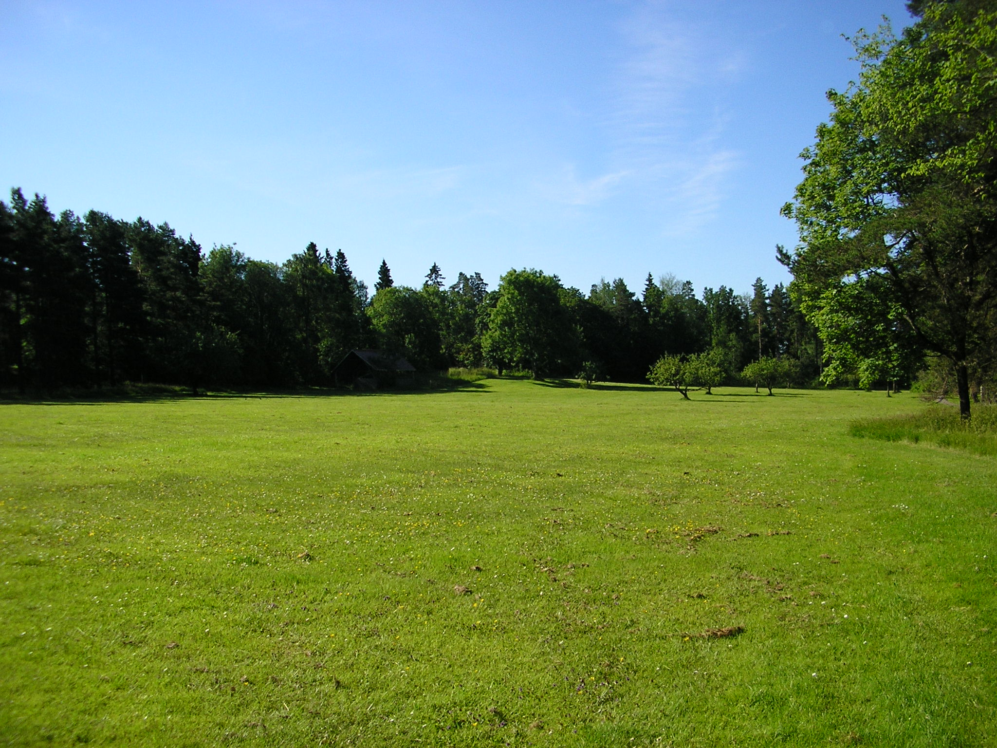 Park i Korseberg, Vänersborg.